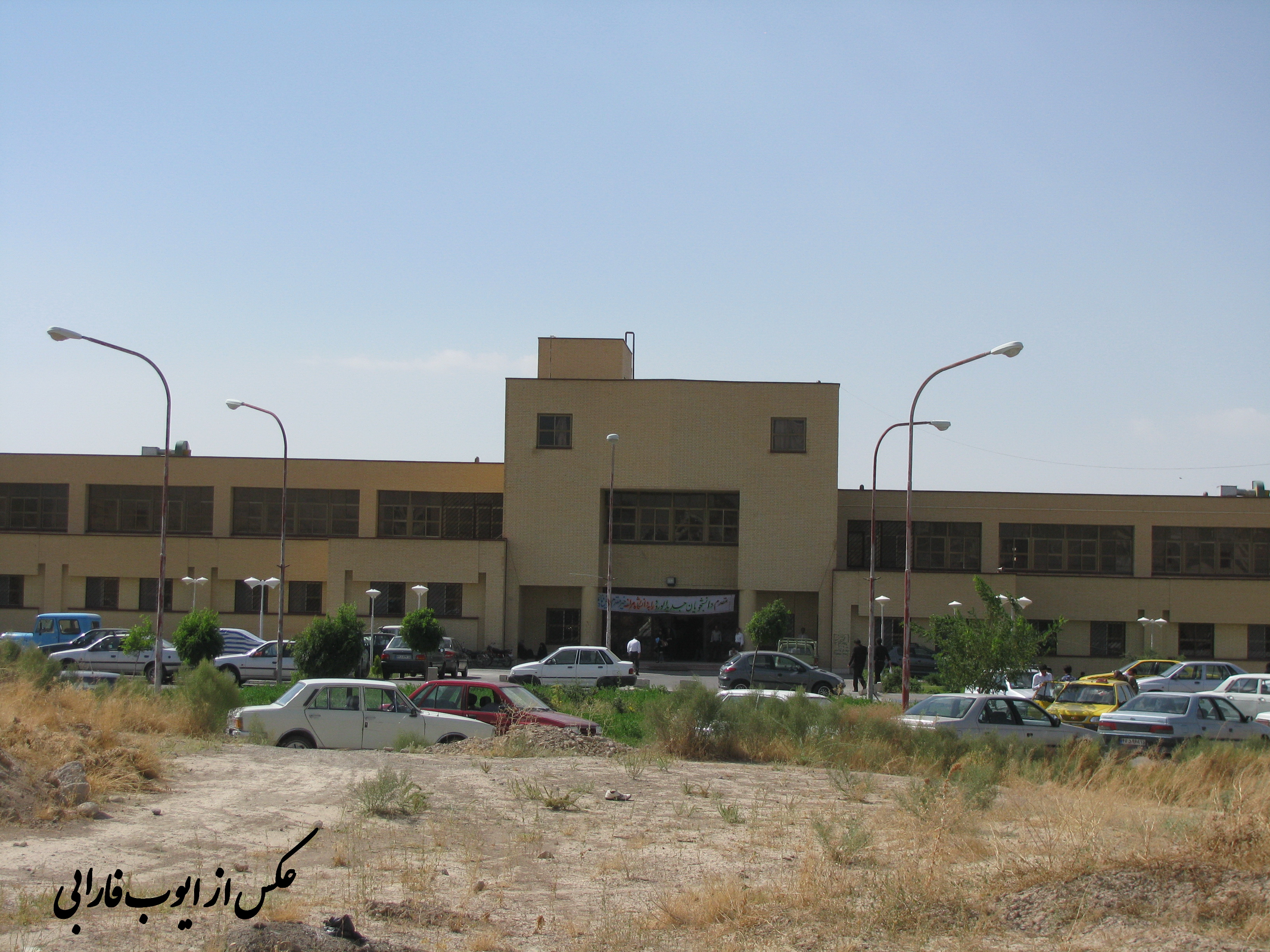 دانشگاه مراغه